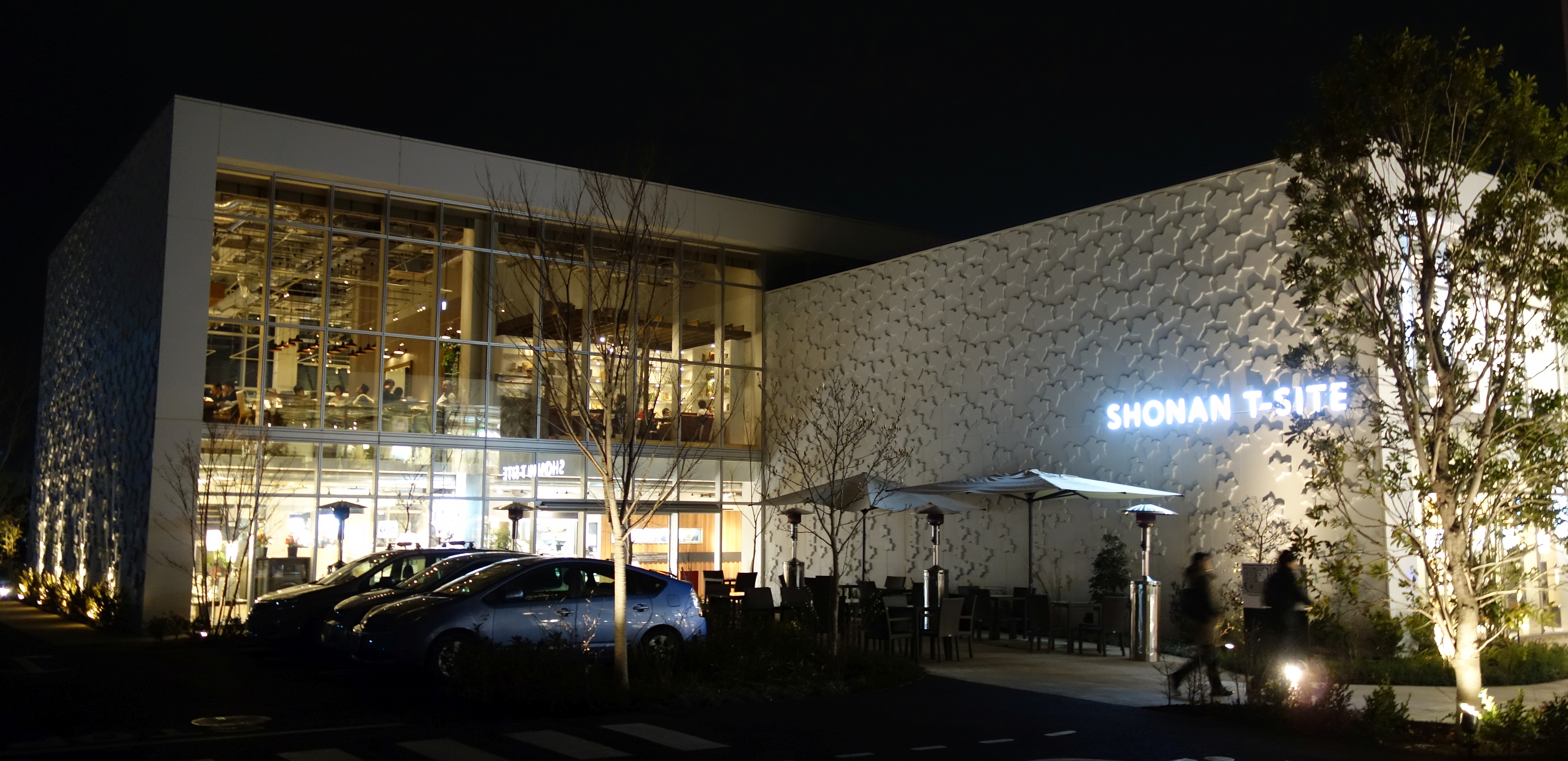 湘南T-SITE